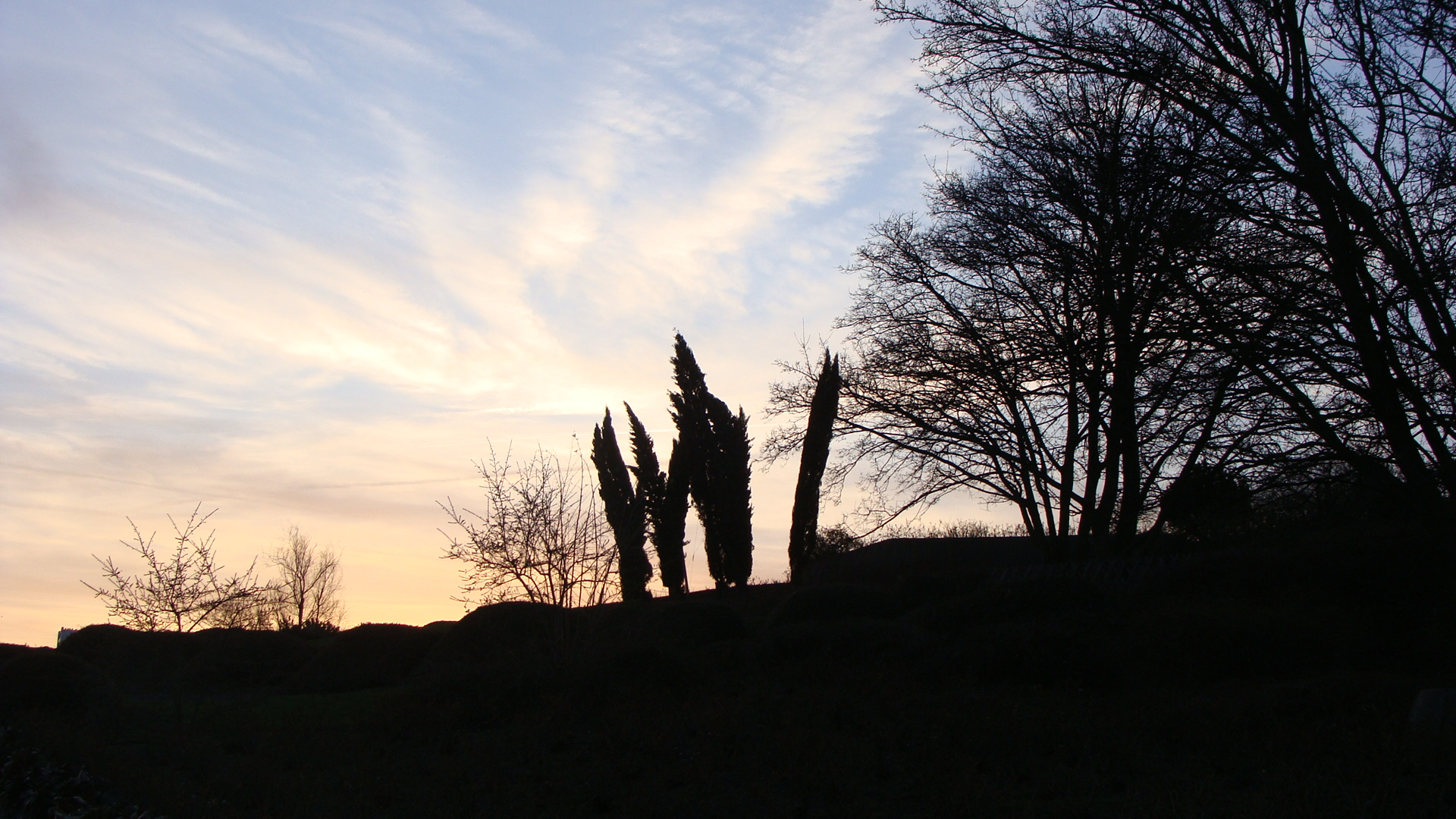 Vue d'artiste : Le parc s'endormant , alors que le ciel lui chante une berceuse qui vibre sur les feuilles , le parc doucement s'assombrit pour le repos.